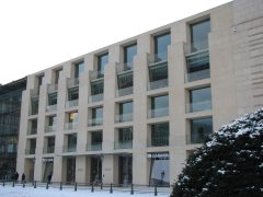 Sitz der DDV Geschäftsstelle in Berlin, Pariser Platz 3